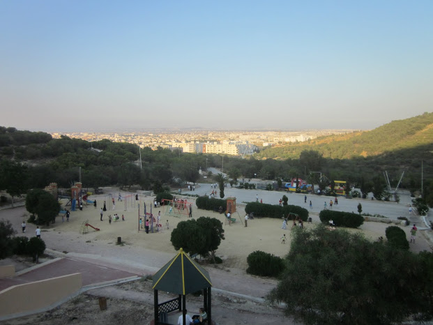 منتزه النحلي